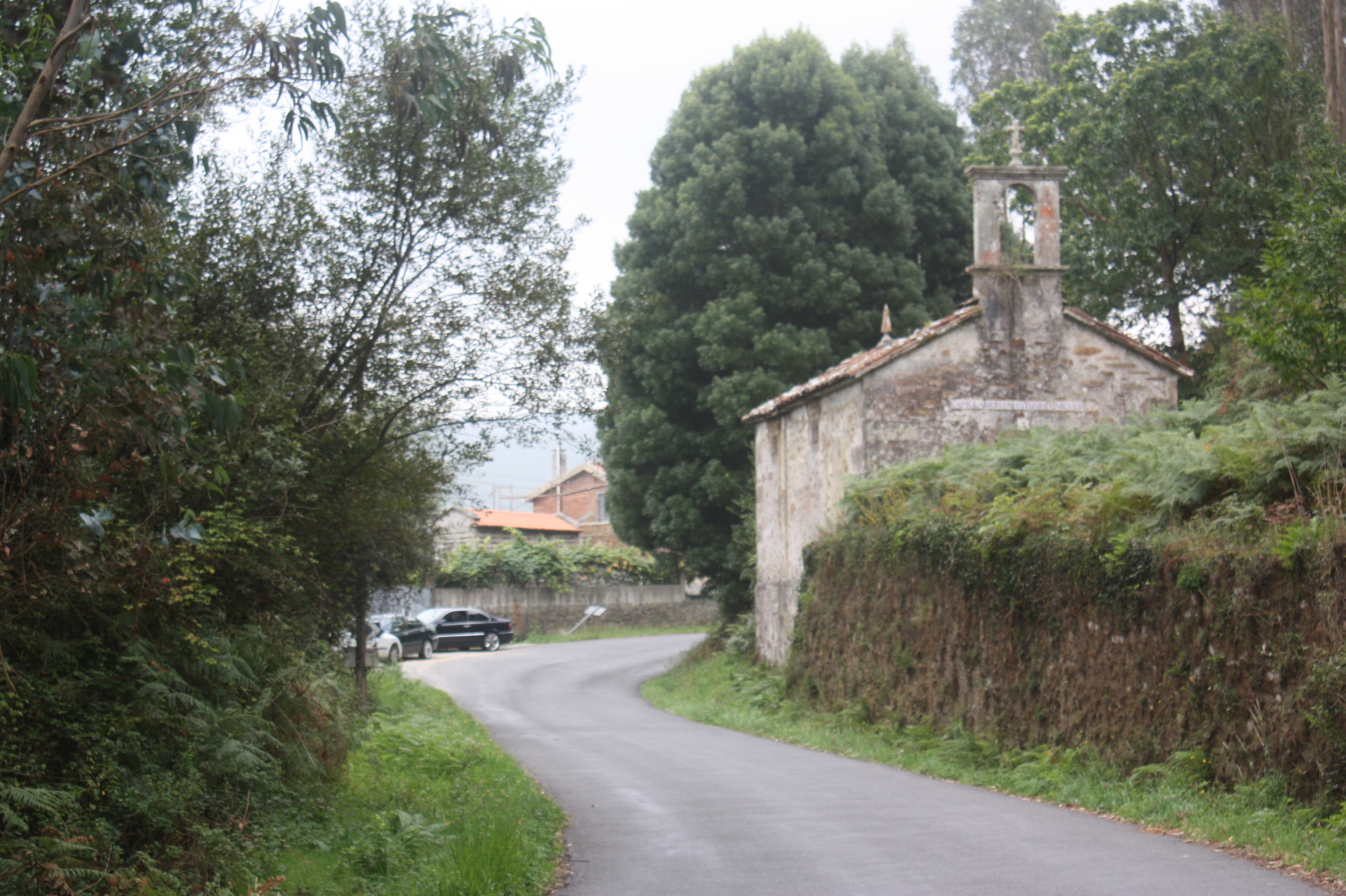 Ermida de Nosa Señora das Neves, O Bosque, Cesullas, Cabana de Bergantiños, Cabana de Bergantiños